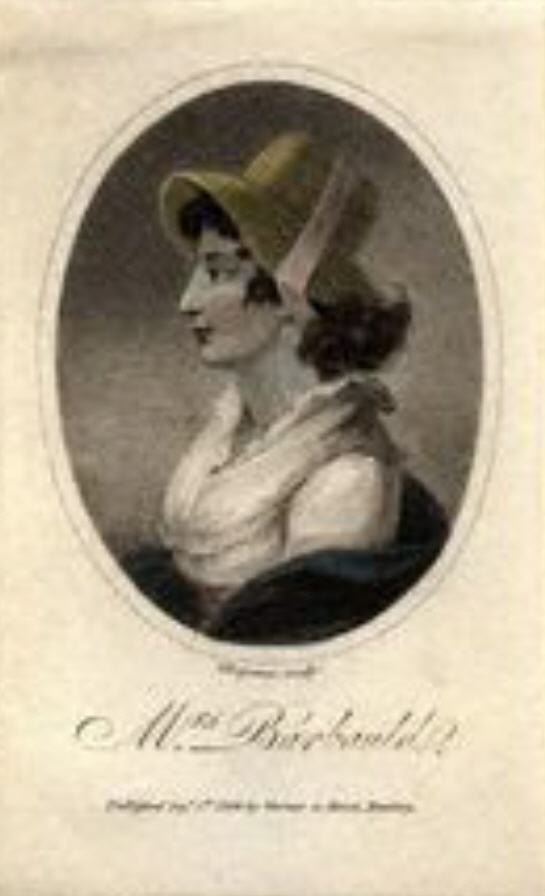 Anna Laetitia Barbauld (* 1743; † 1825), englische Autorin.